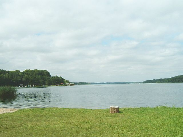 Südende des Plauer Sees bei Bad Stuer in Mecklenburg Vorpommern